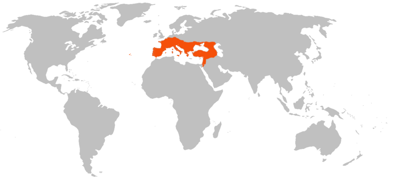 Mapa de distribución del Myotis myotis